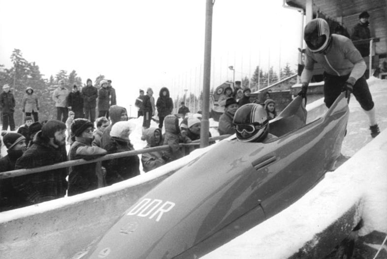 Bernhard Lehmann, Ingo Voge ADN-ZB Schaar 26.3.83 Suhl:Rennschlitten-Zweierbob-Am ersten Tag der DDR-Meisterschaften im Zweierbob und Rennschlittensport in Oberhof bestimmten die STarter vom gastgebenden Armeesportklub eindeutig das Geschehen. Nach dem zweiten Durchgang belegten Bernhard Lehmann und Ingo Voge mit 1:33,60 den zweiten Platz.